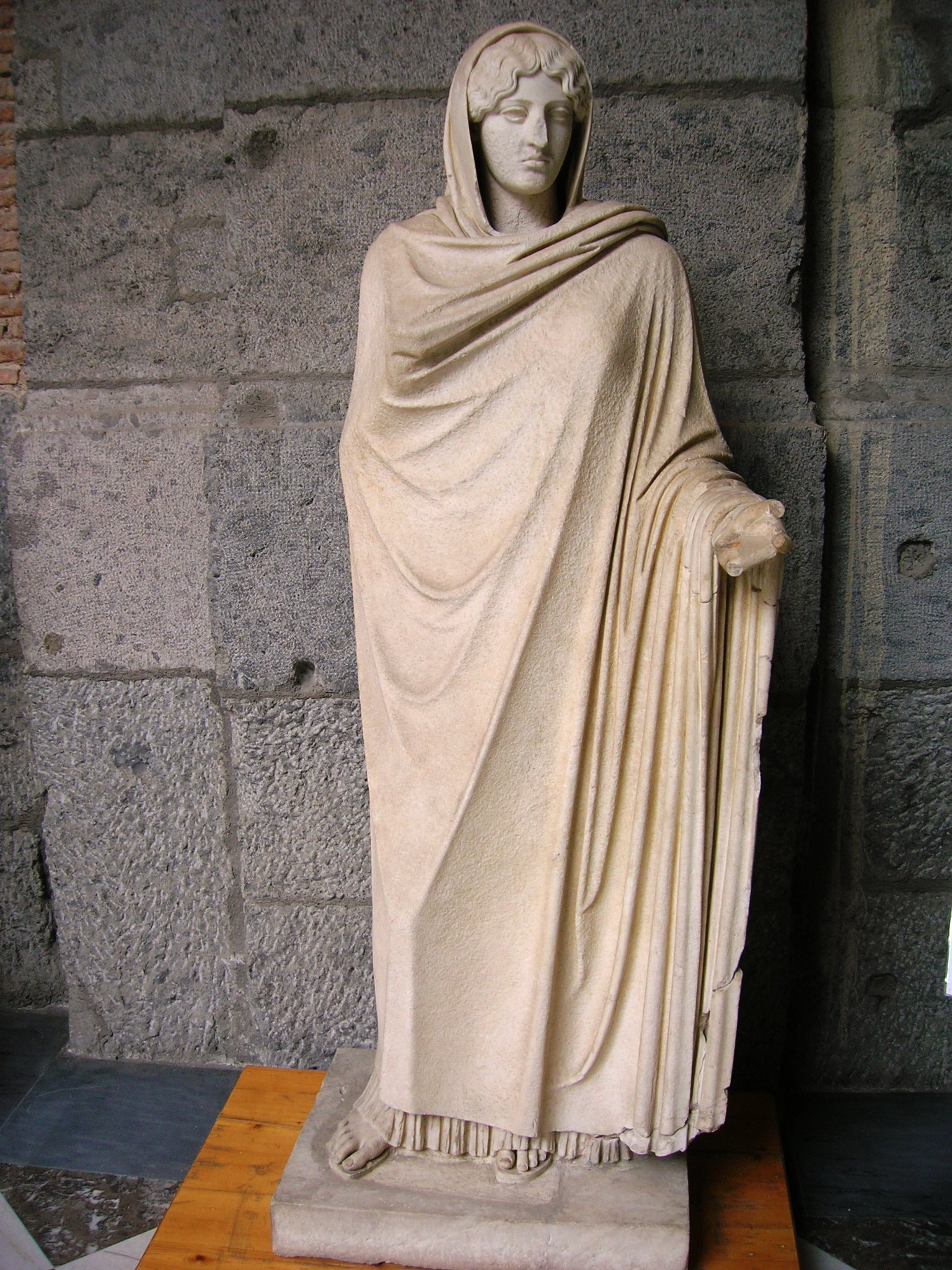 L'Afrodite Sosandra al museo archeologico nazionale a Napoli